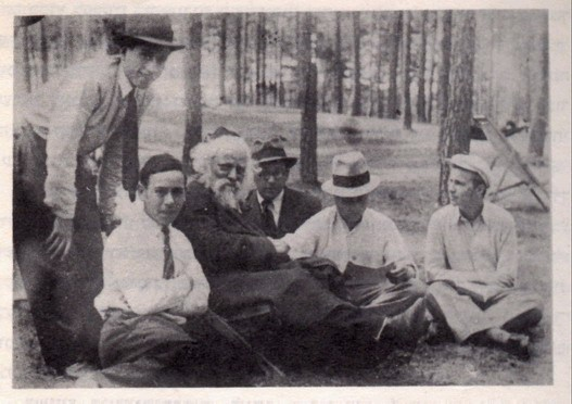 Rabbi Boruch Ber Leibowitz with his students